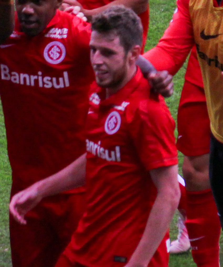 Aylon no Inter em 2016